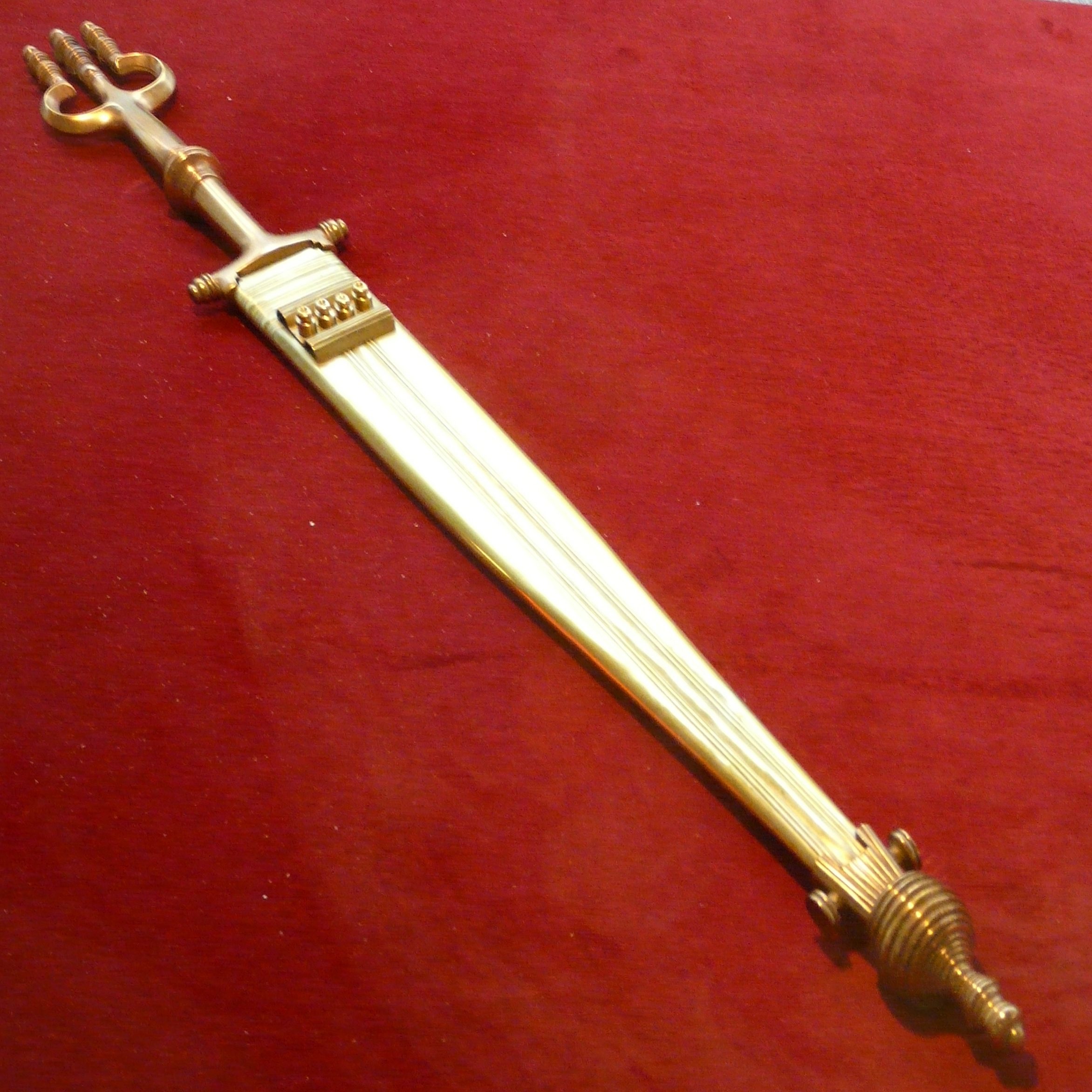 Hallstattzeitlicher Bronzedolch, Replik im Neanderthal-Museum